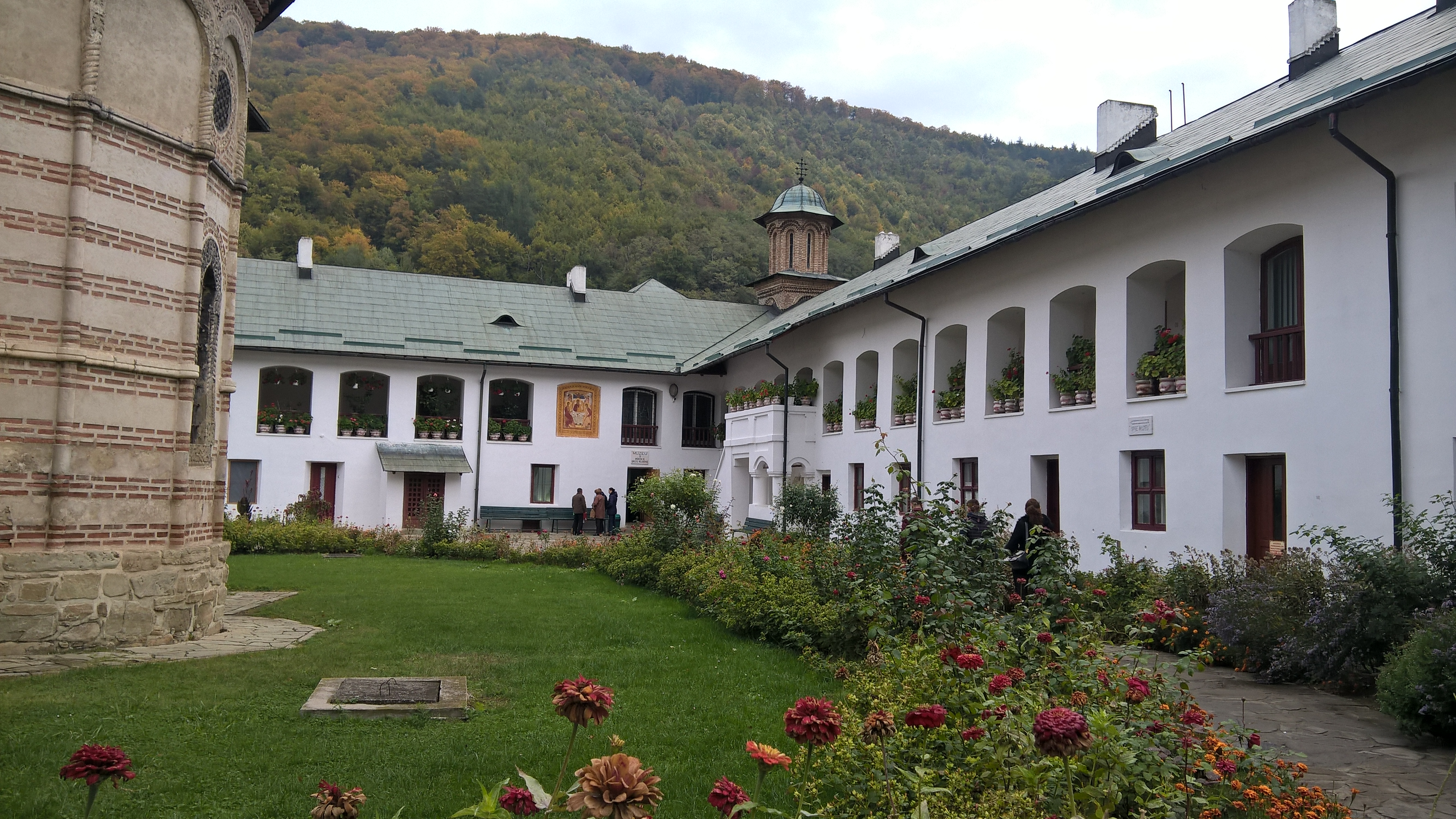 Mănăstirea Cozia, Paraclisul „Adormirea Maicii Domnului” 02